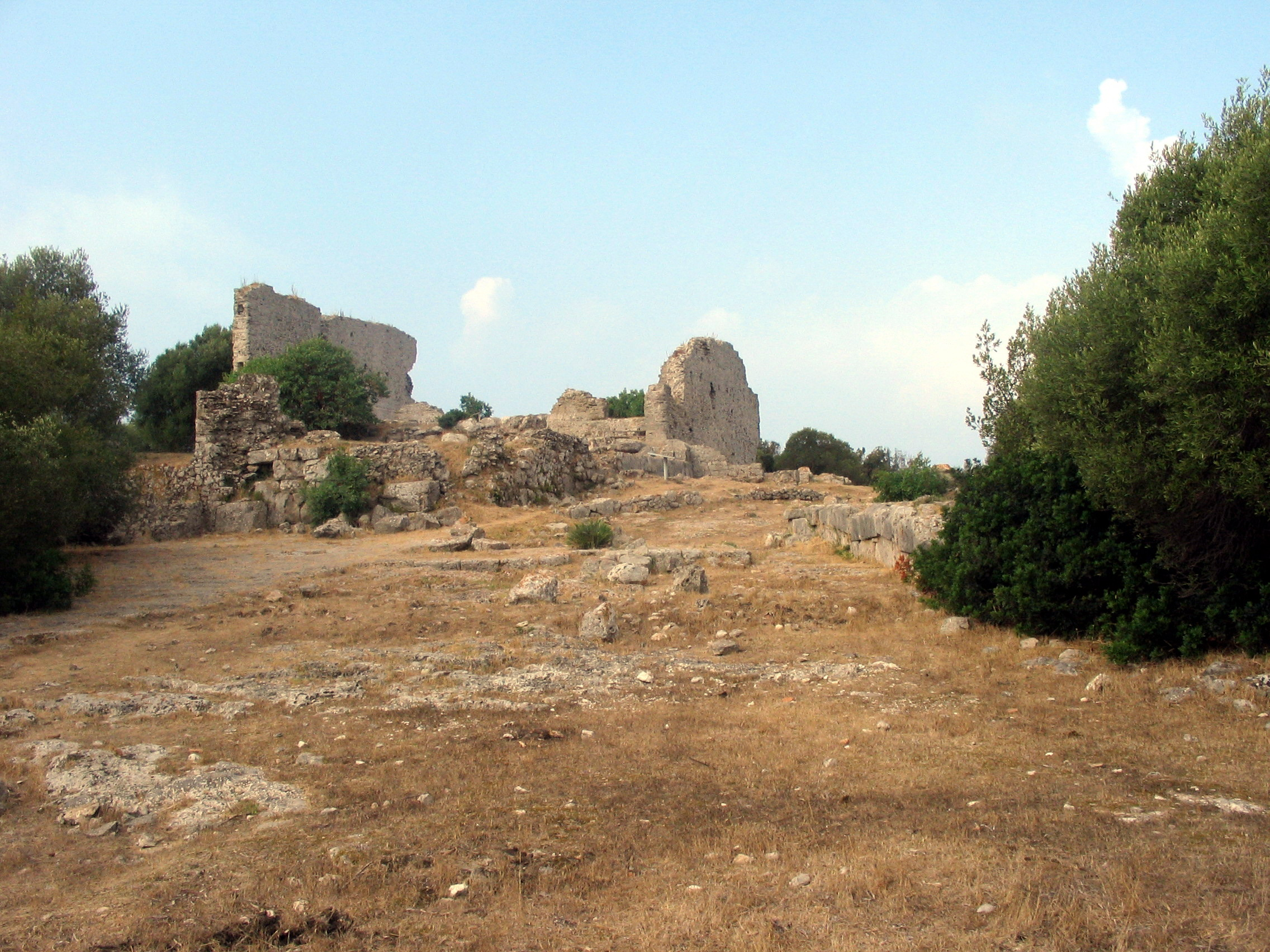 Cosa, Ansedonia, Orbetello, Toscana, Italia